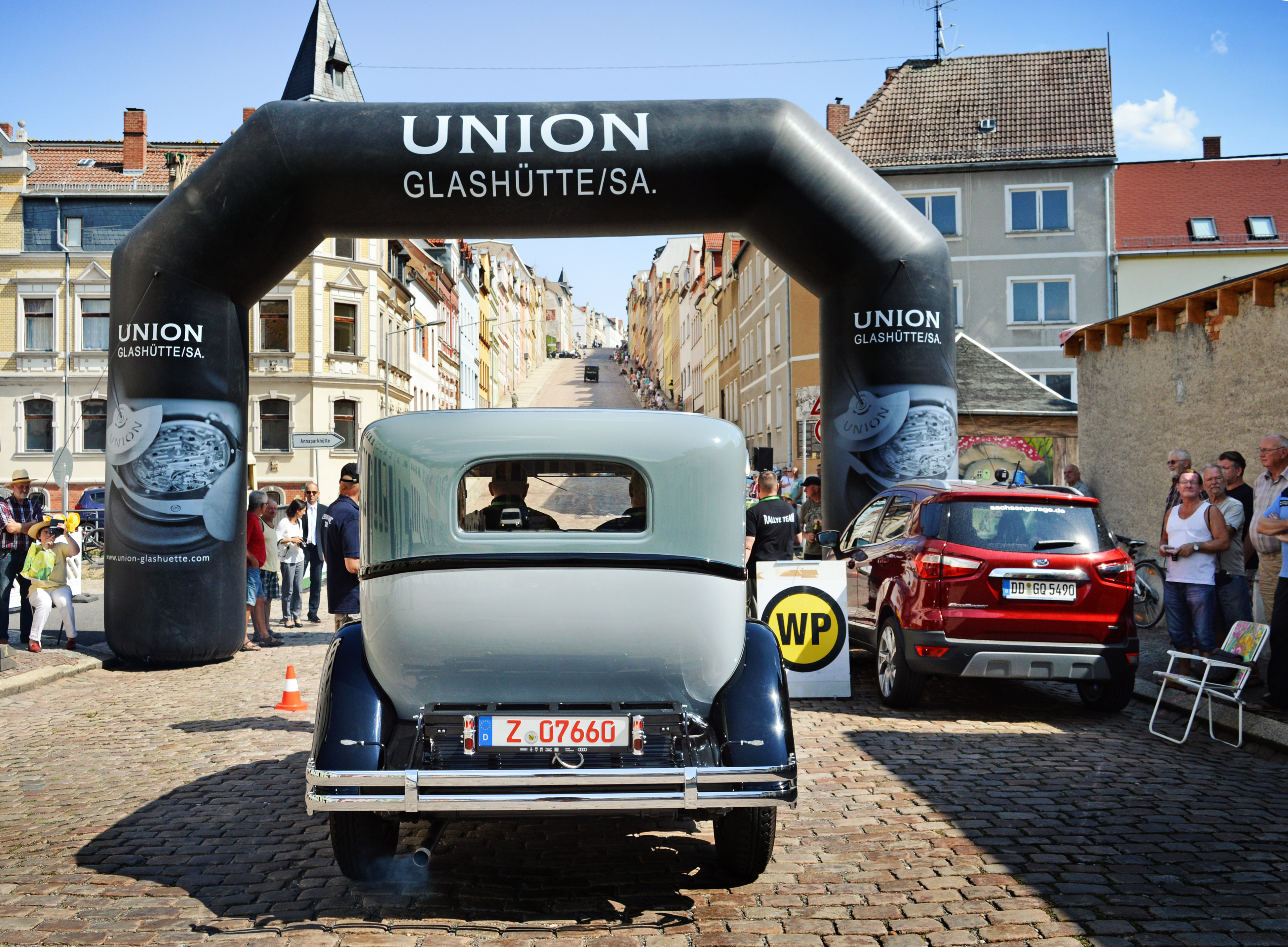 Union Glashütte Sachsen Classic Rallye 2018